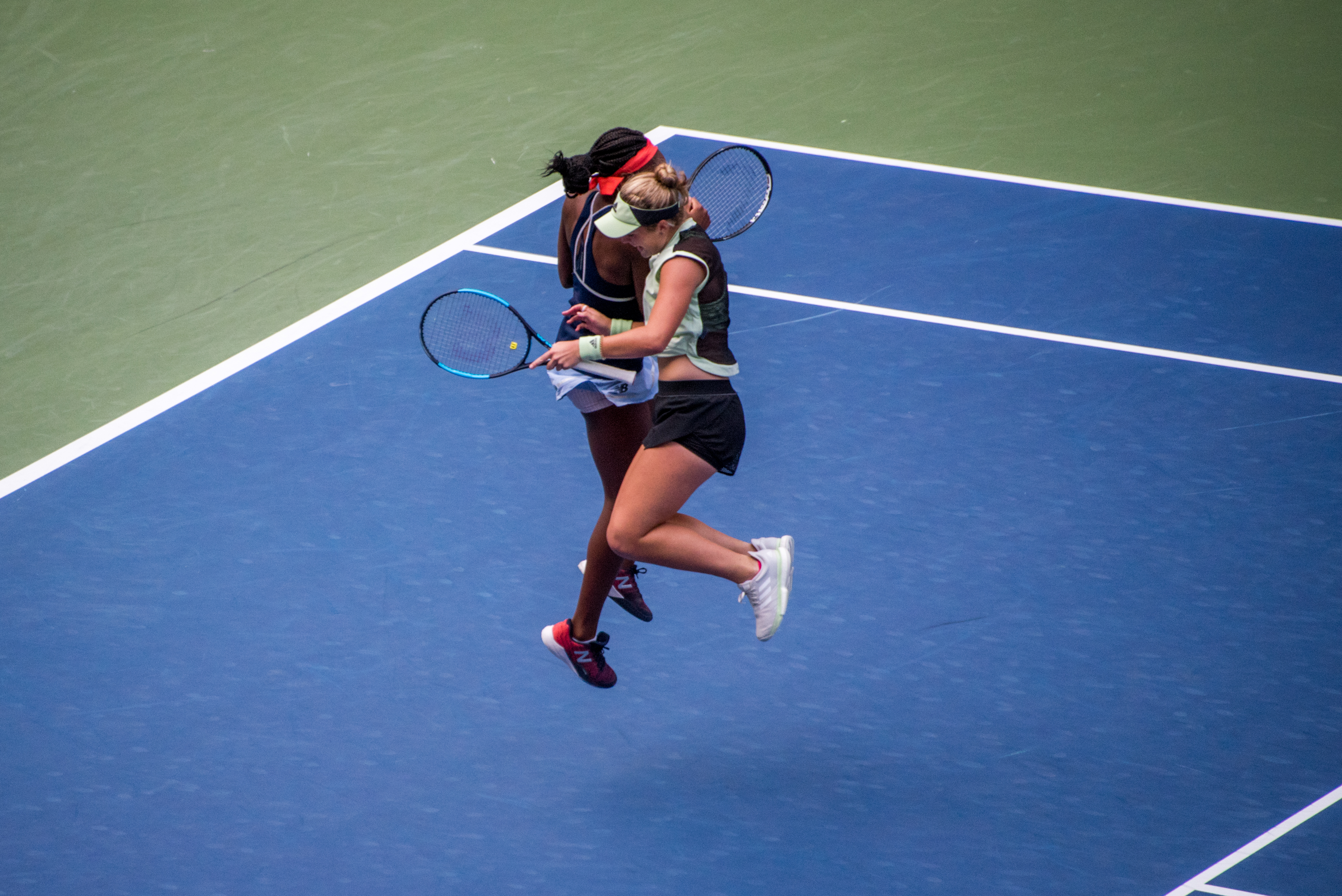 McCoco